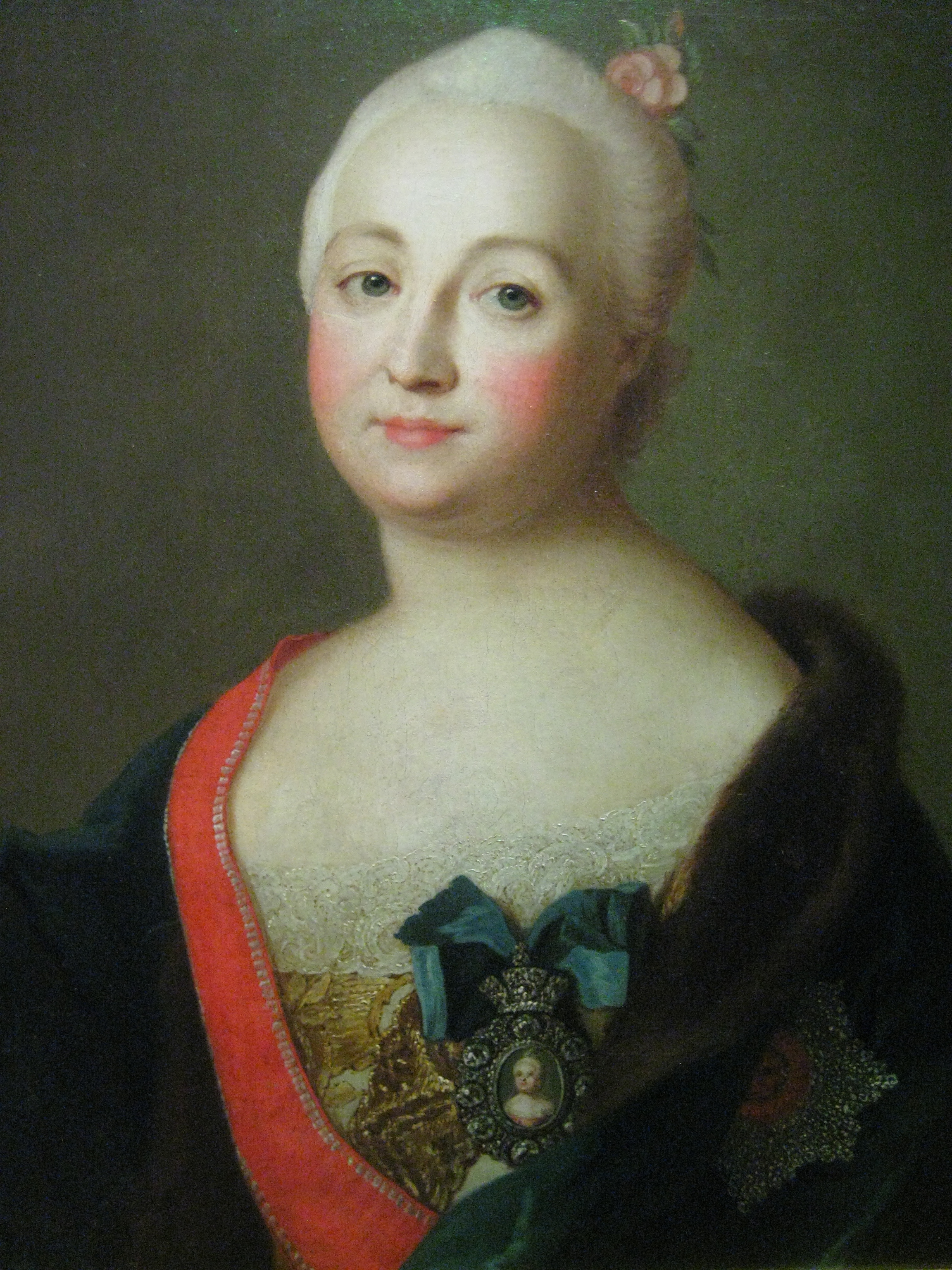 А.К. Воронцова. Неизвестный художник с оригинала Л. Токе. ГИМ